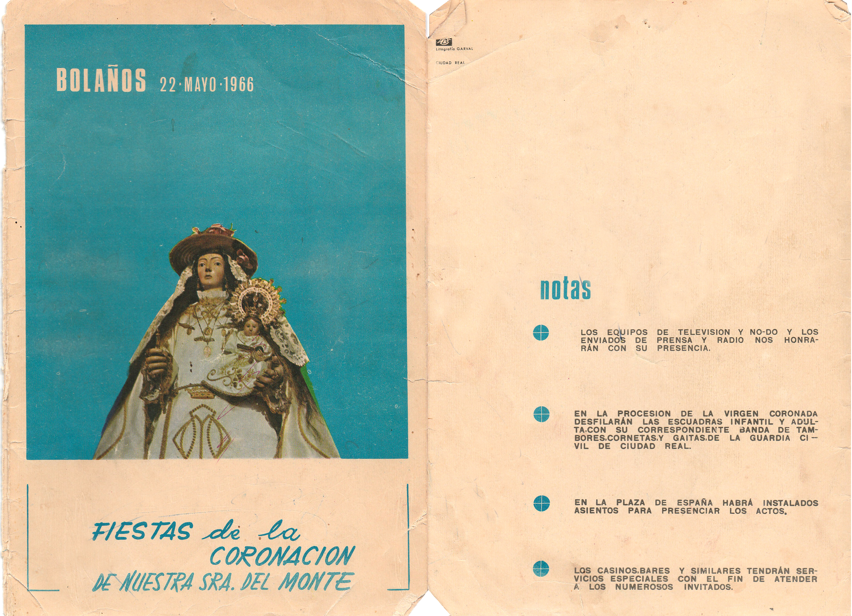 Fiestas de la Coronación Canónica de Nuestra Señora del Monte, Bolaños de Calatrava 1966